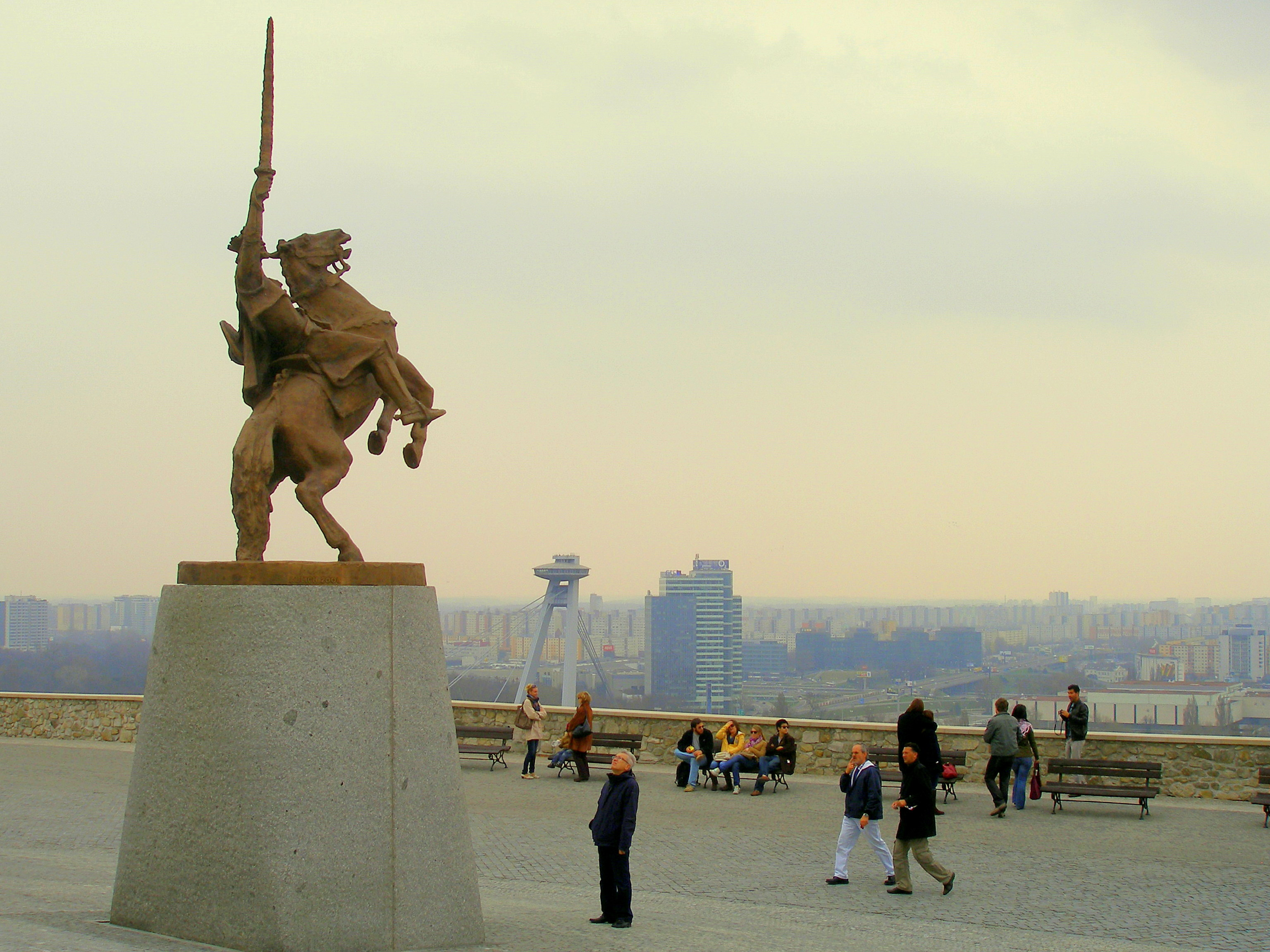 Bratislava hlavné mesto Slovenskej republiky.Hradný vrch.